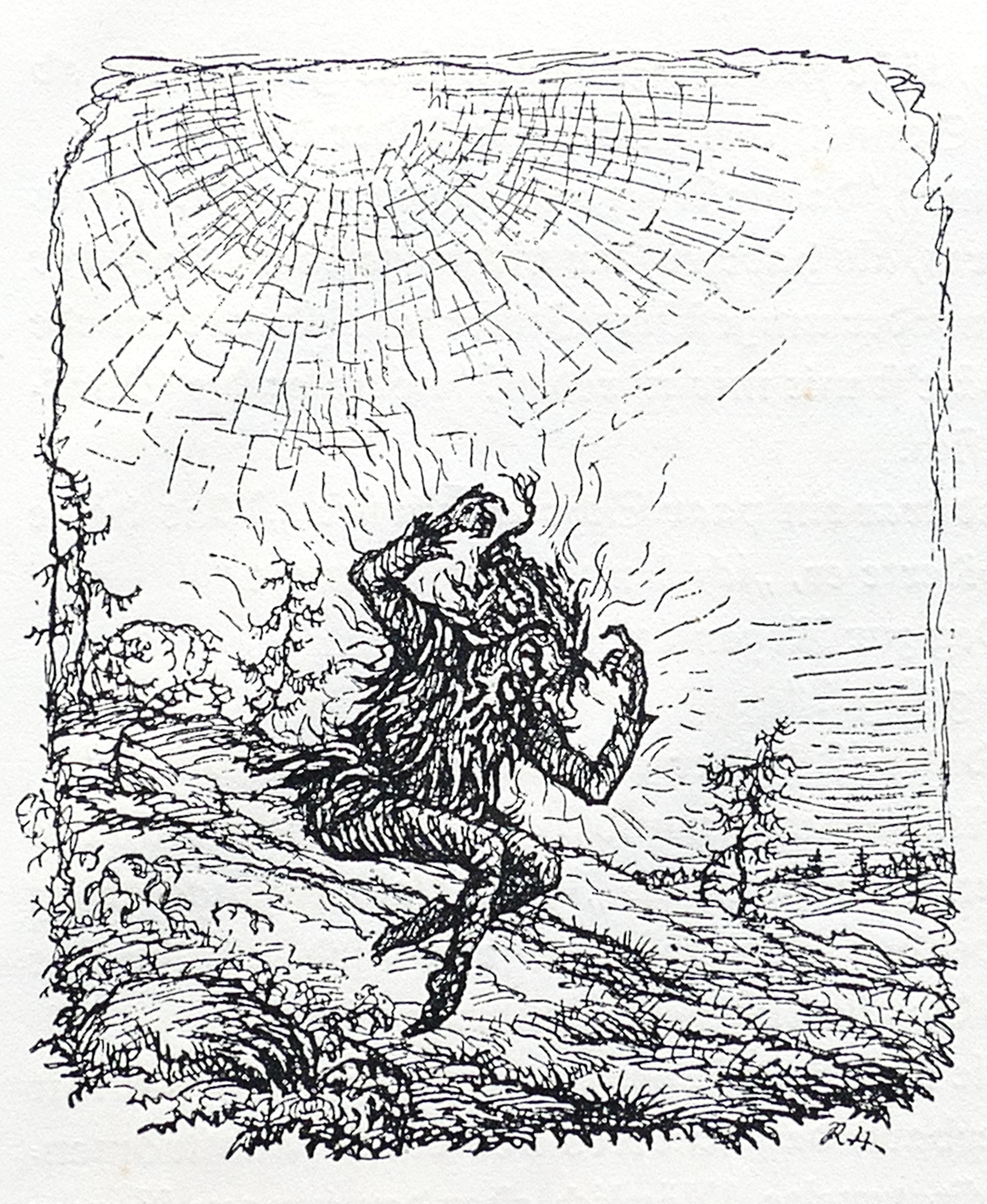 Buchillustration von Rolf von Hoerschelmann (1885 - 1947) in "Drei Märchen von Theodor Storm", Musarion Verlag München 1925